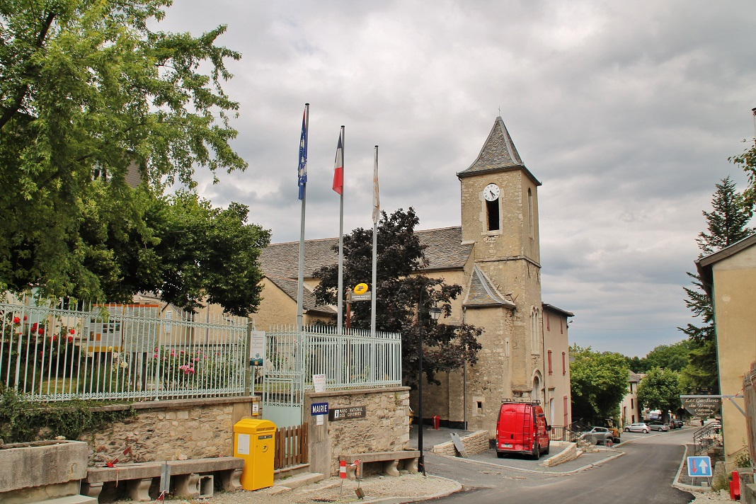 église St Flour